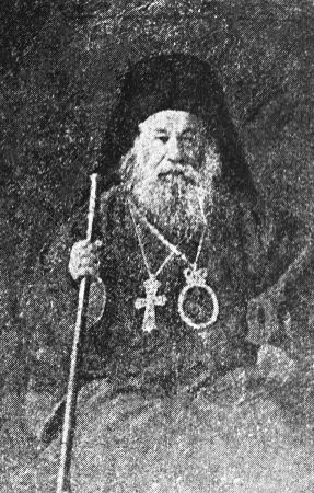 Евгениос Патерас